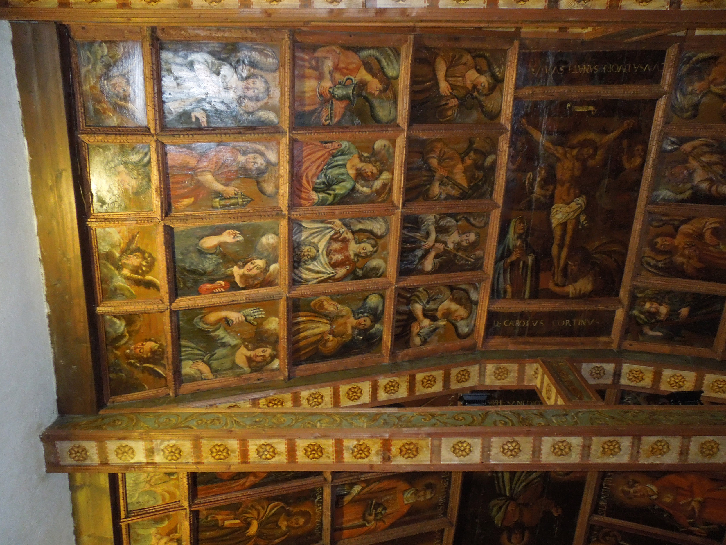 Particolare del soffitto ligneo dipinto della Chiesa di San Bartolomeo di Villa Popolo in provincia di Teramo.